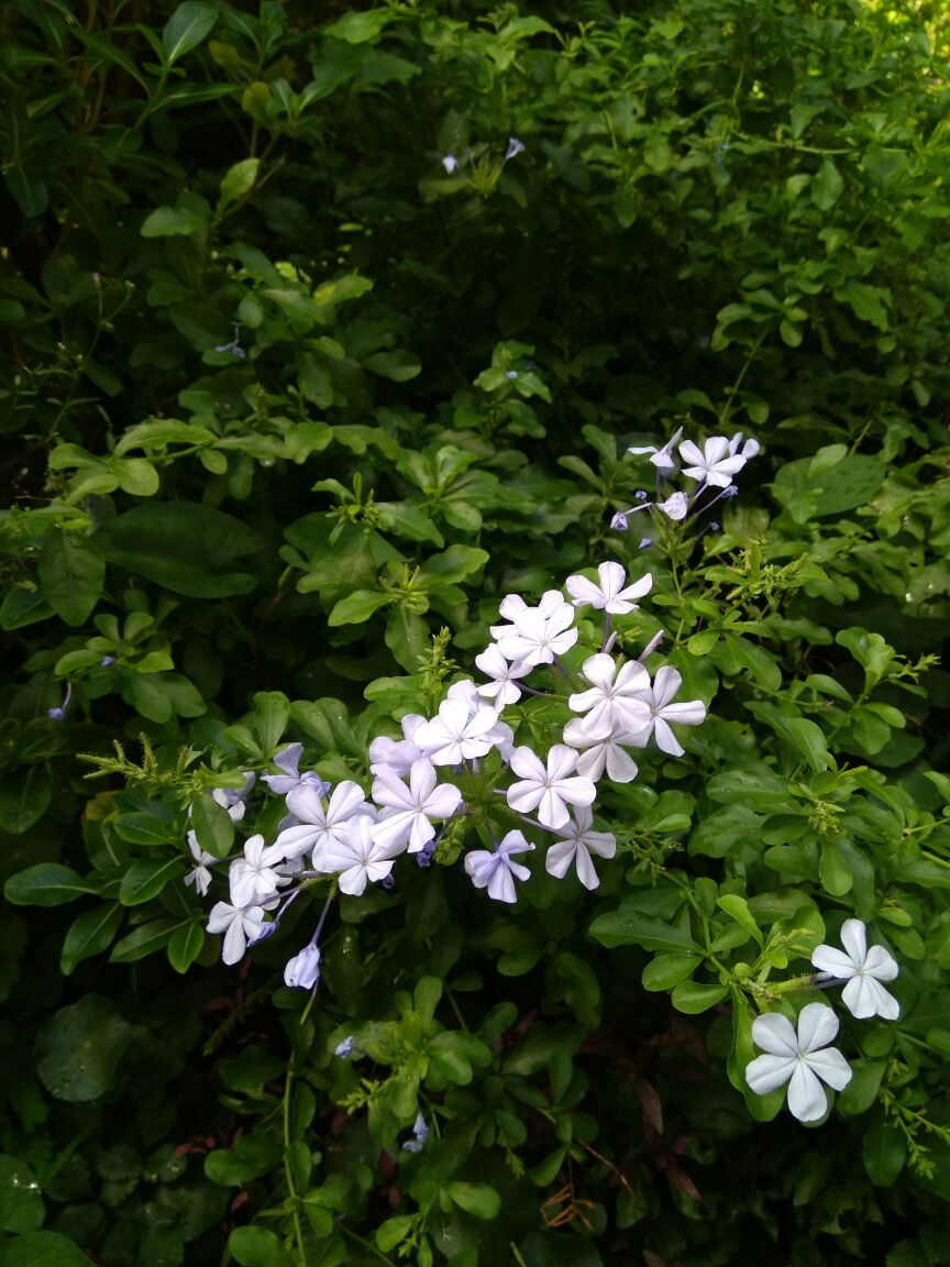 新加坡蓝雪花花序